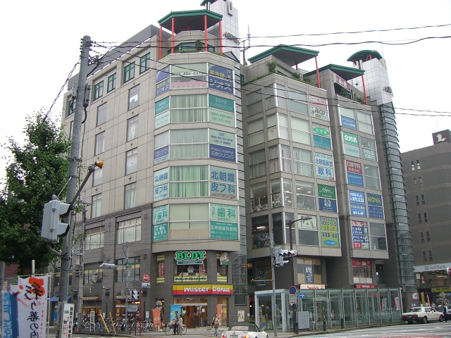 朝霞台駅北口アゴラ21